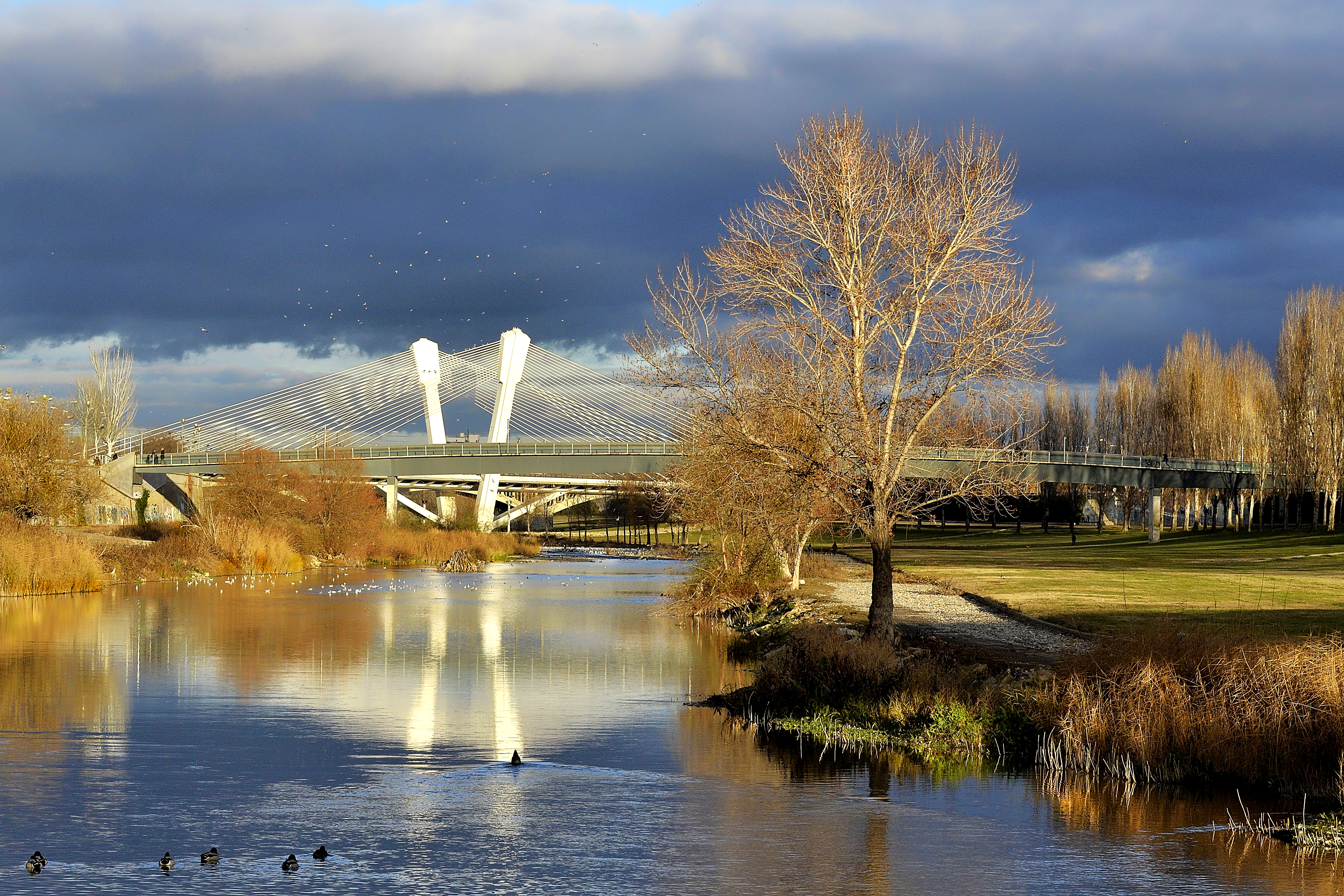 Rio Segre vista desde la pasarela de los Campos Eliseos, al fondo el puente de Principe de Viana